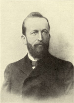 Hermann Howaldt (* 26. November 1852 in Kiel; † 17. Mai 1900 ebd.) Ingenieur, Mitbegründer und Mitglied des Vorstandes der Howaldtswerke AG (heute:HDW), Direktor der Abt. Maschinenbau.